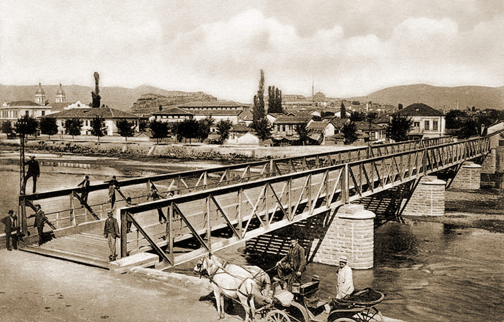 Скопје, новиот мост над реката Вардар, 1911 година.